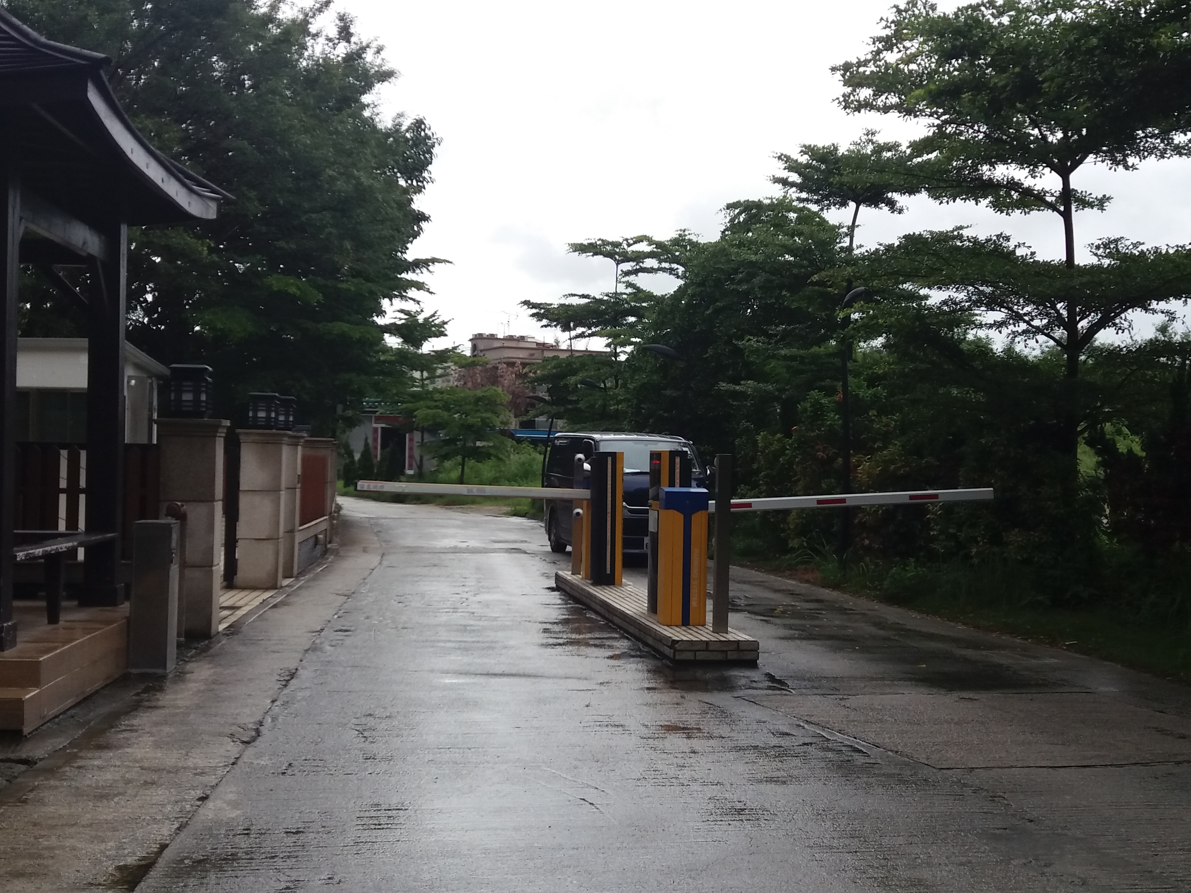 中文（香港）: 巒山壹號入口（2018年7月）